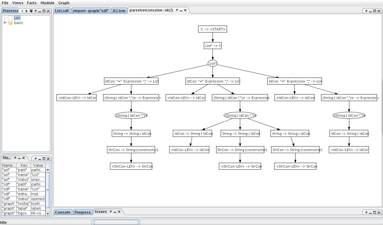 Captura de tela do ASF+SDF Meta Environment com código fonte linguagem de listas.